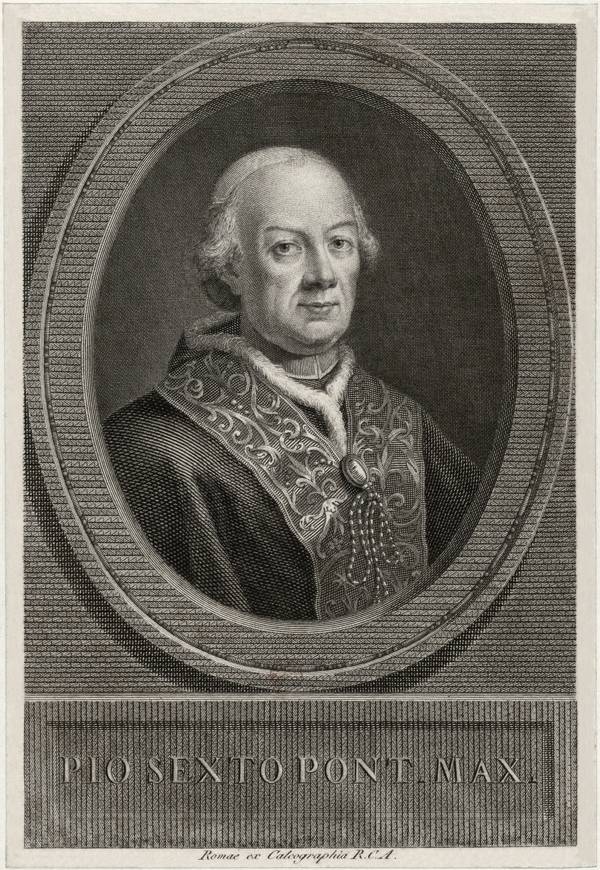 Pie VI (1717 - 1799), 250ème pape de l'Eglise catholique romaine.